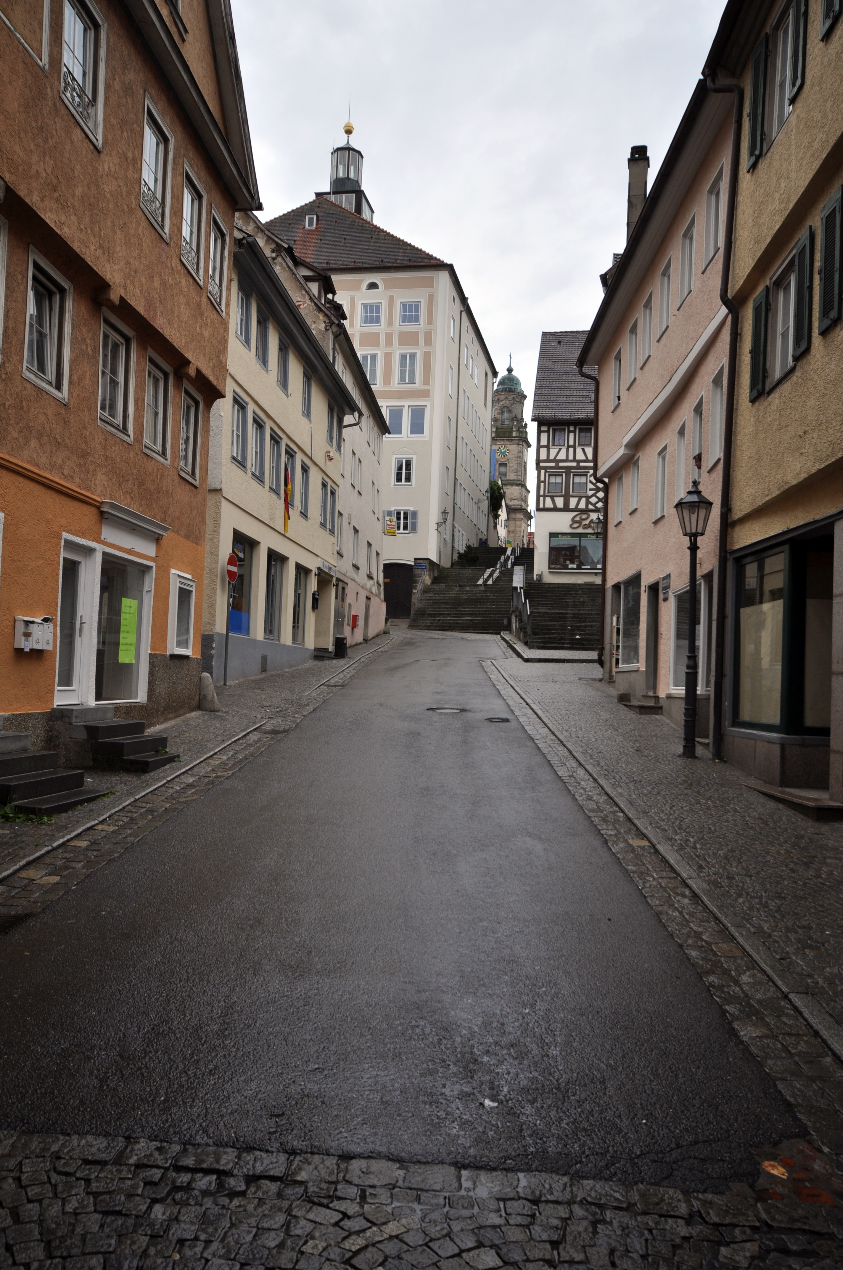 Hechingen